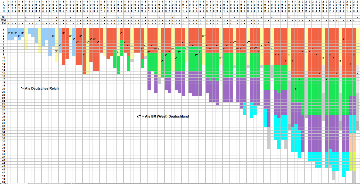 Platzierung der deutschen Eishockeynationalmannschaft (dt. Reich, BR West, BRD) bei EM, WM und olympischen Spielen